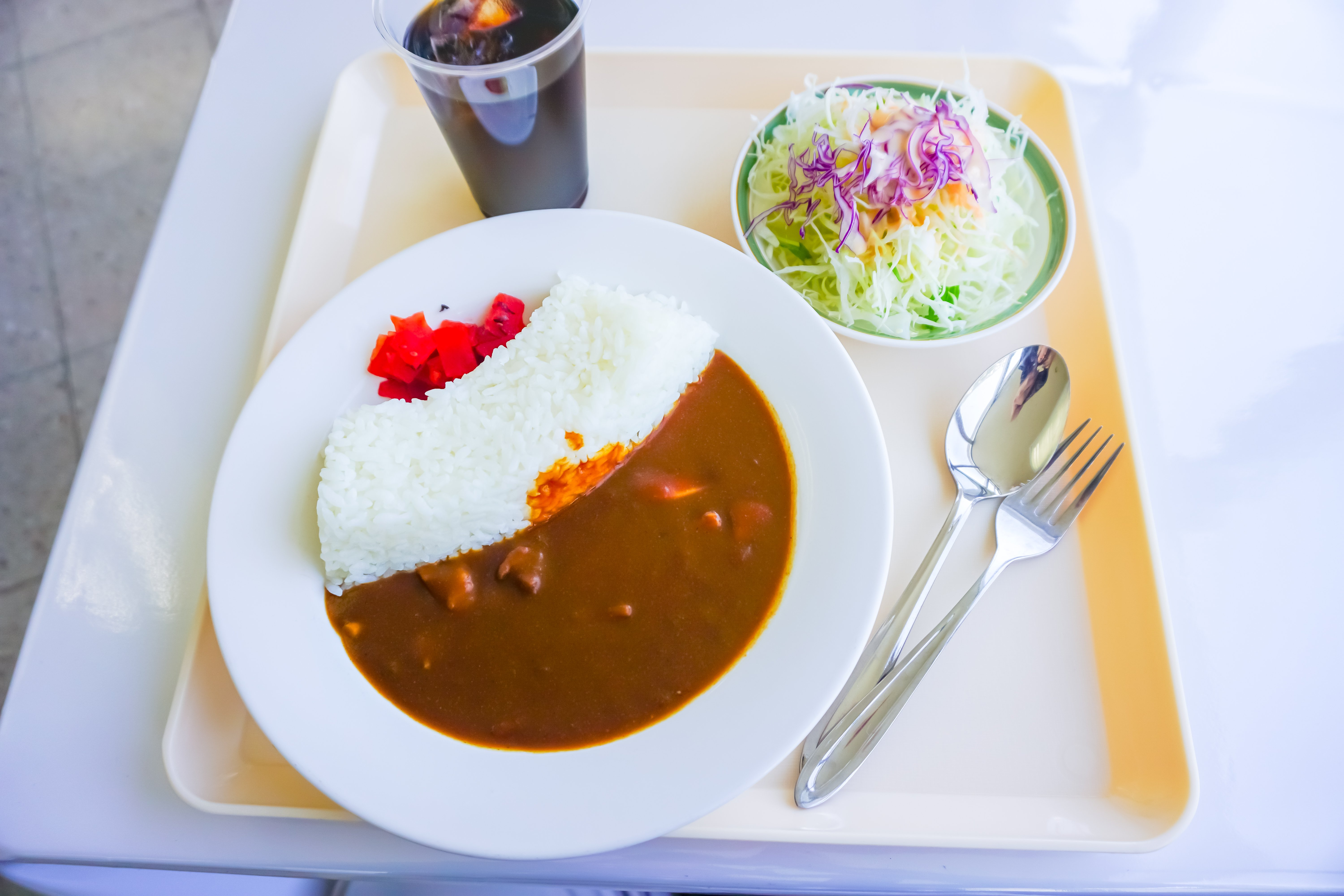 長野県大町市、扇沢レストハウス、アーチダムカレー、扇沢駅、立山黒部アルペンルート、カレーライス